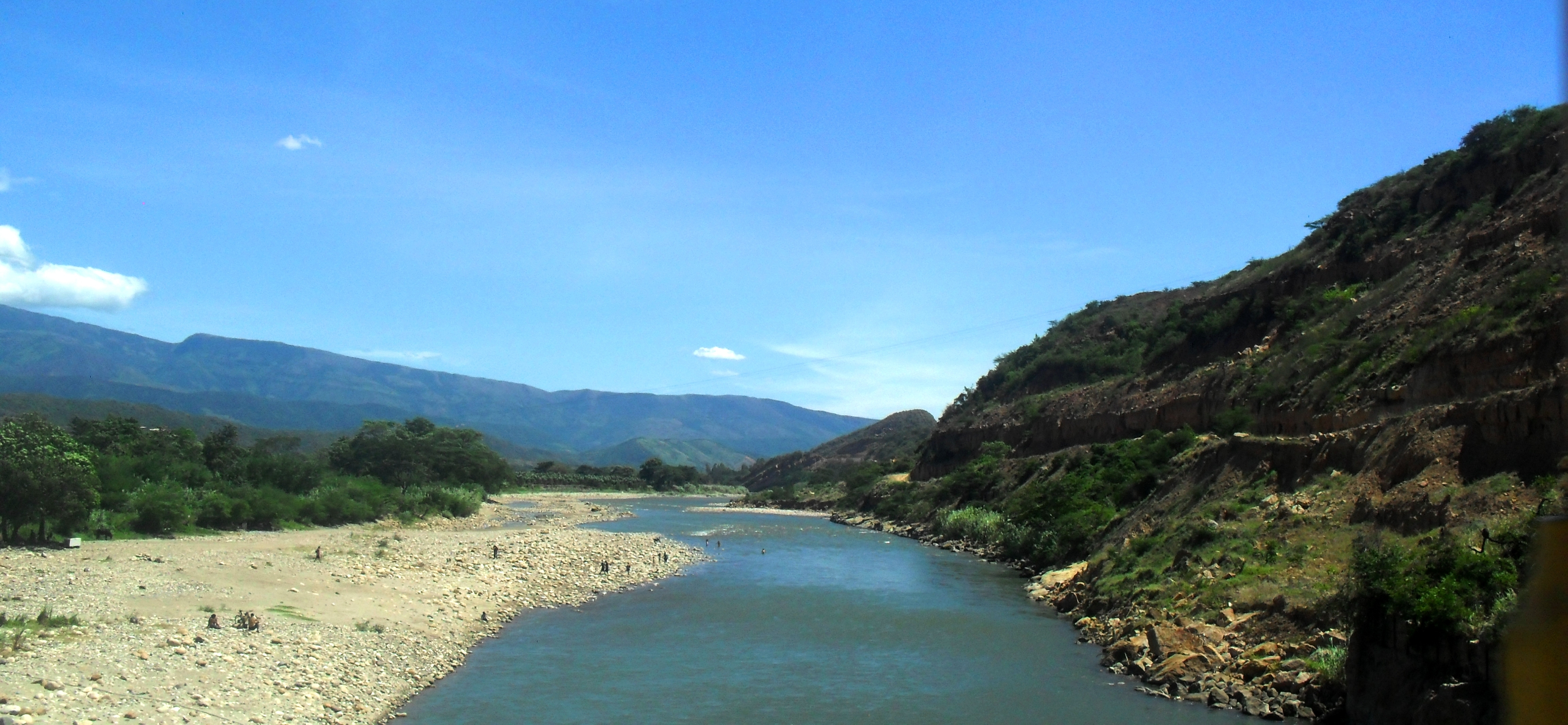 El río zulia del puente mariano ospina perez,tributario del río Catatumbo .